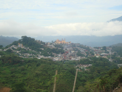 Foto tomada desde el cerro San Antonio, Tila, Chiapas